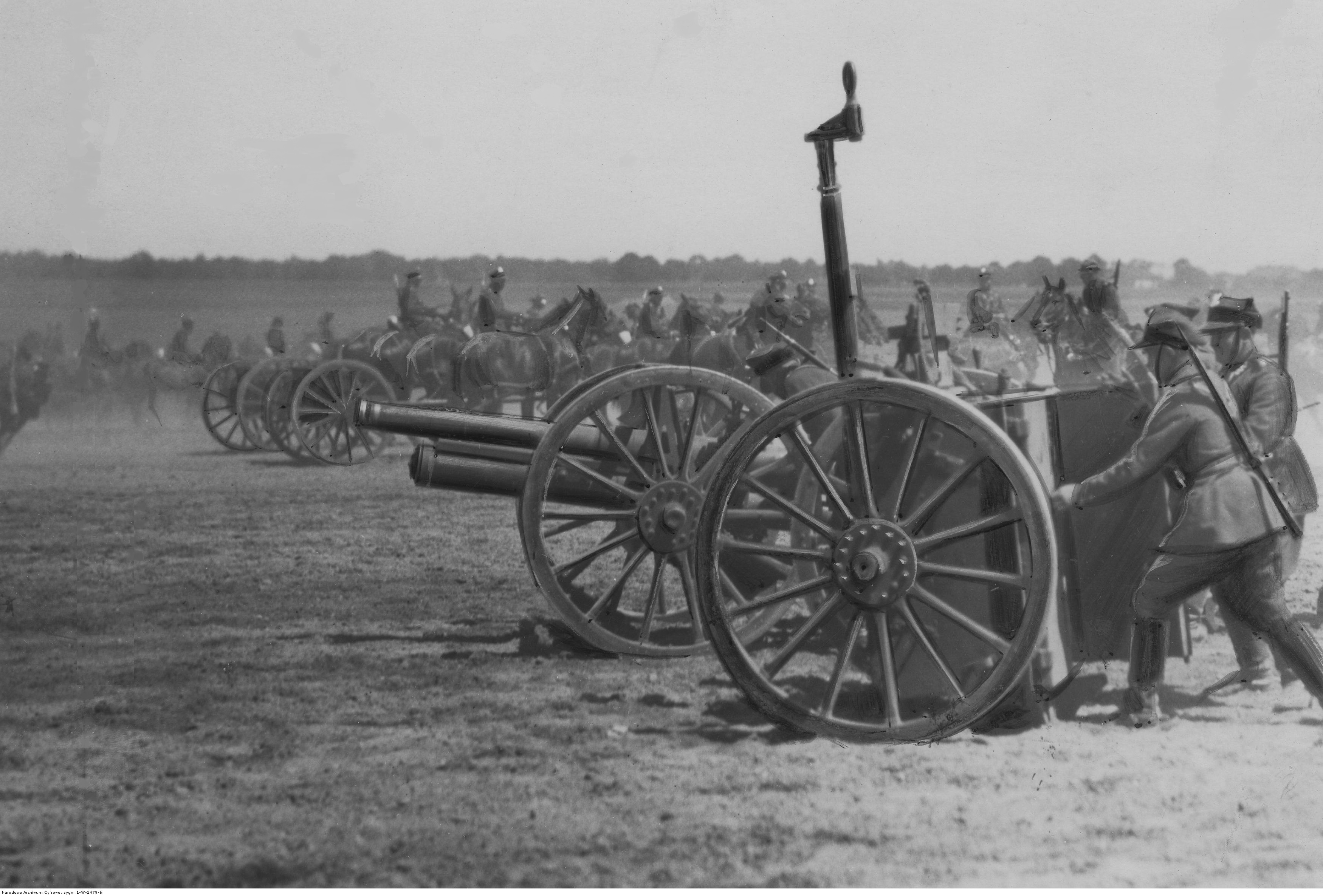 XV rocznica powstania 7 Dywizjonu Artylerii Konnej w Poznaniu. Ćwiczenia artyleryjskie z okazji święta pułkowego. Widoczna armata polowa 75 mm wz.1902/26 z przodkiem. Koncern Ilustrowany Kurier Codzienny - Archiwum Ilustracji. Sygnatura: 1-W-1479-6